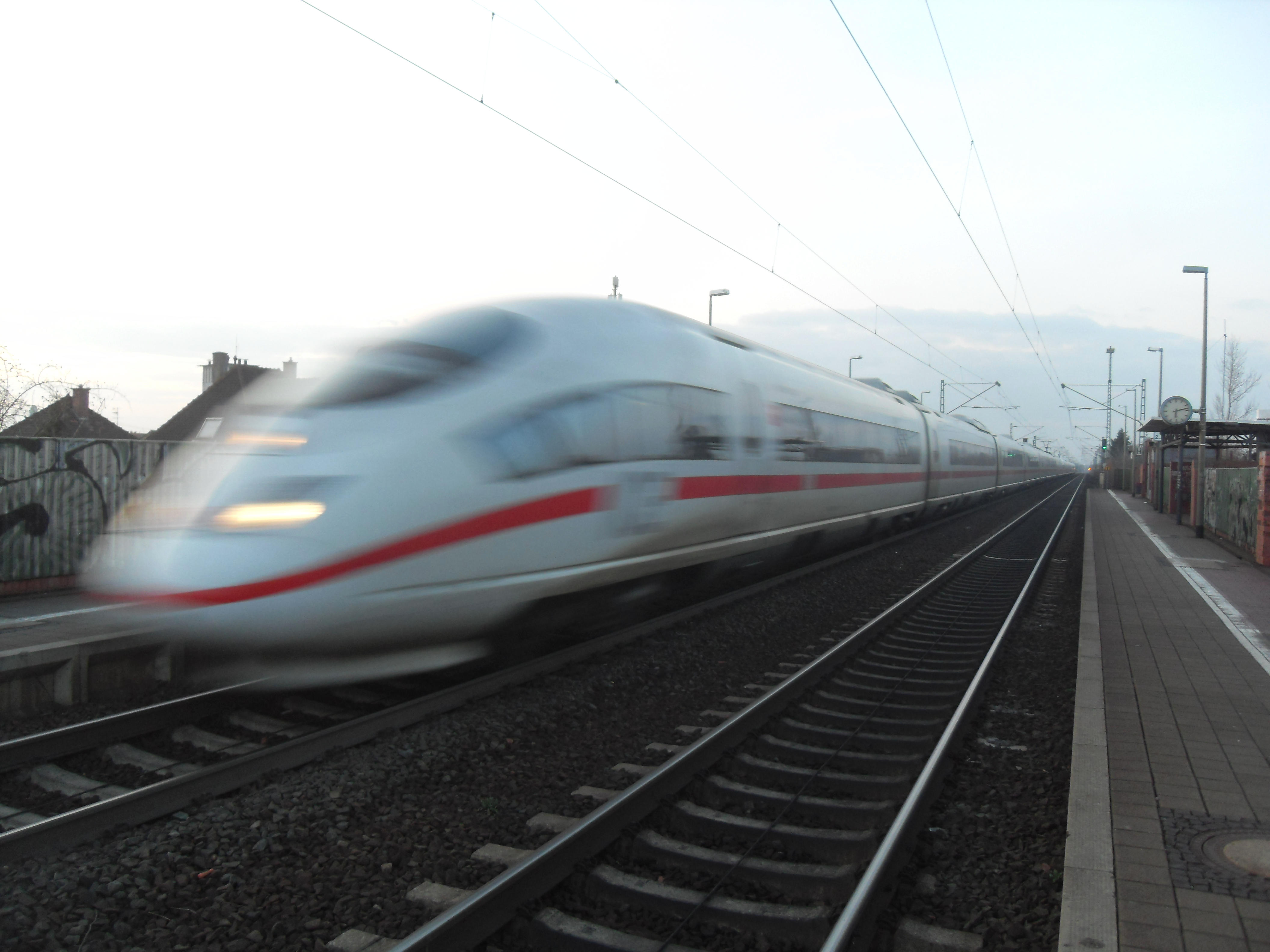 ICE Siemens Velaro auf der Riedbahn im Bürstädter Bahnhof